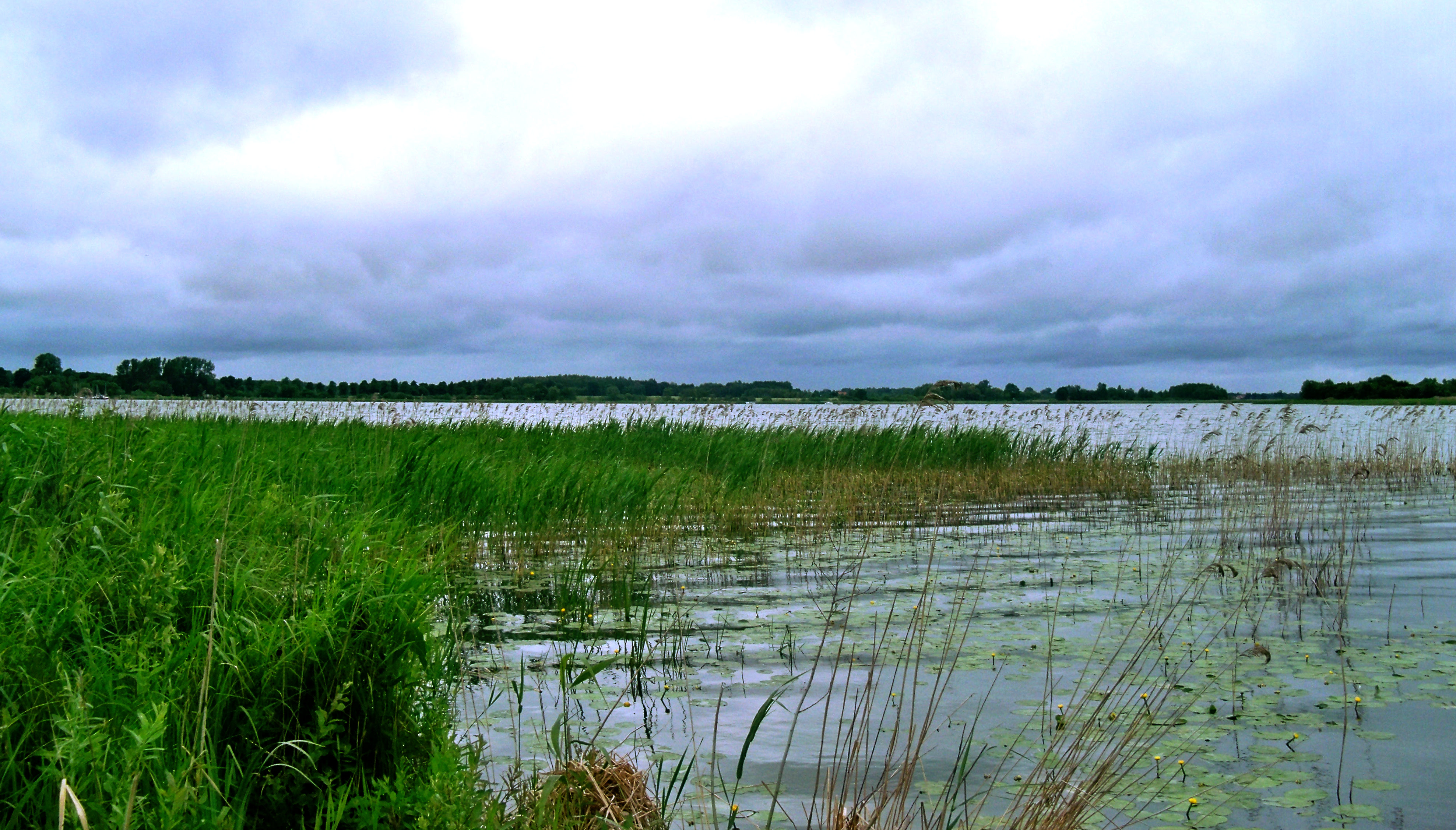 Szymonka (gmina Ryn). Południowa część Jeziora Szymoneckiego.